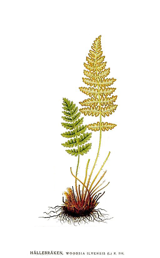 Découpage de l'illustration originale. Une illustration par planche.